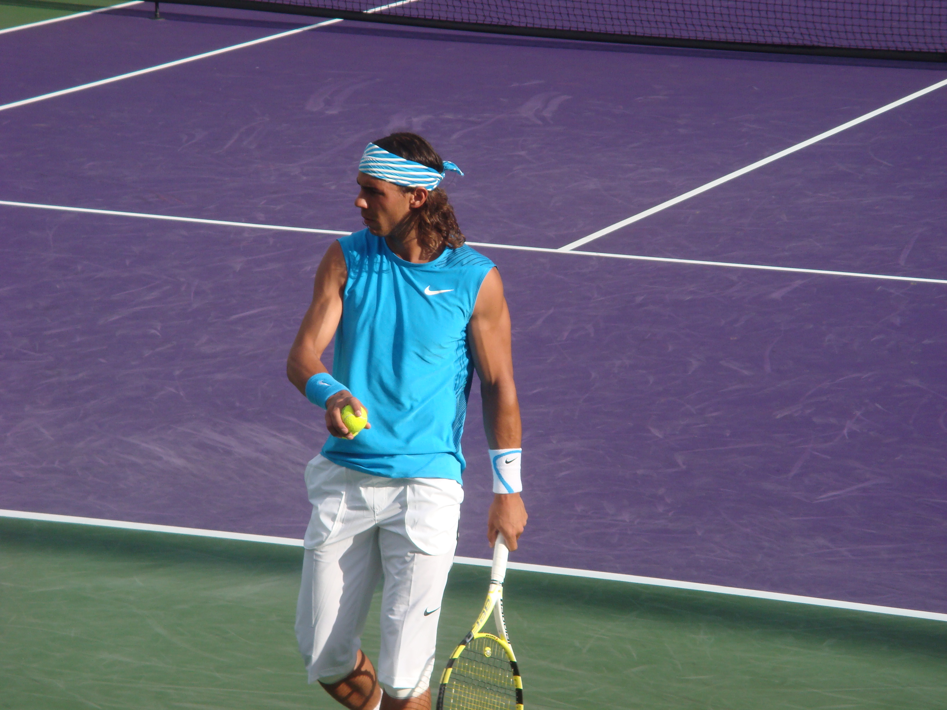 Kiefer x Nadal @ Miami, March, 2008